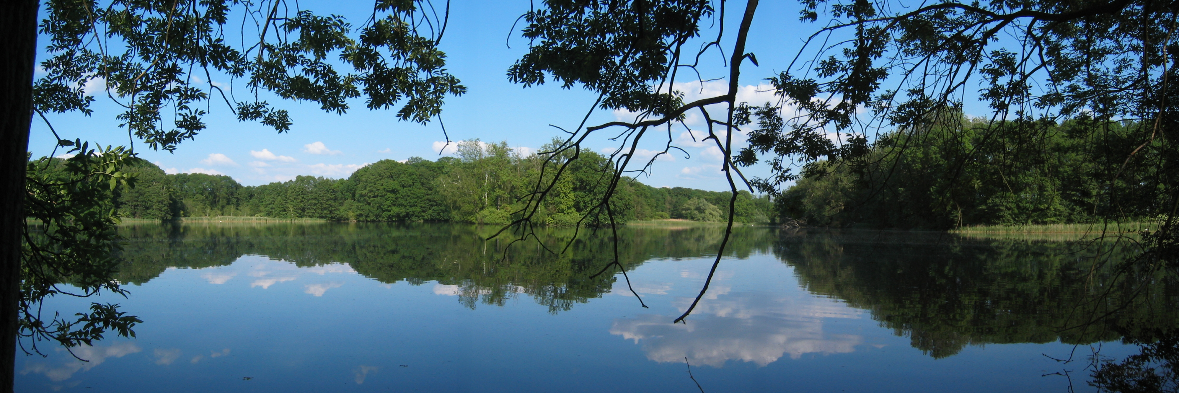 Hintenteich, der mittlere